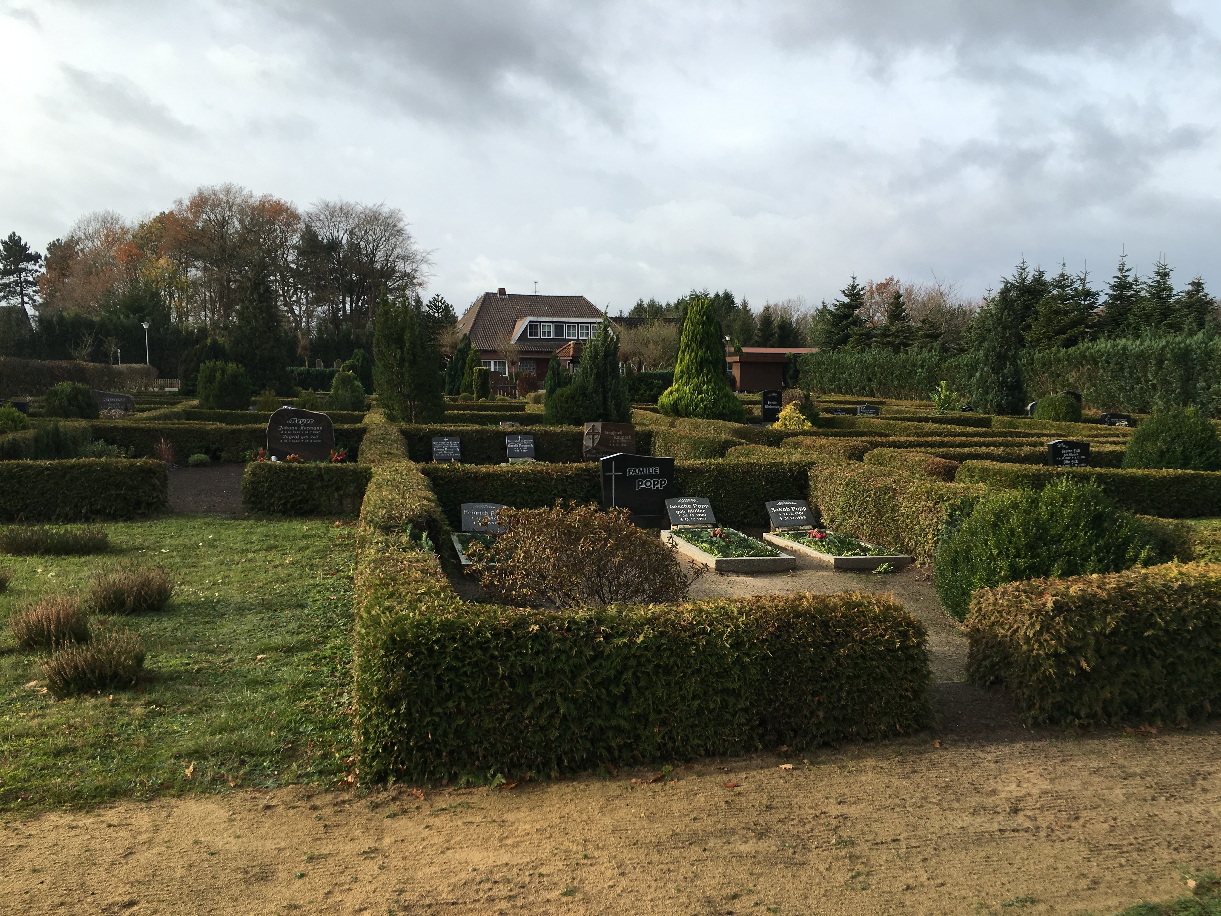 Karkhoff in Langeln